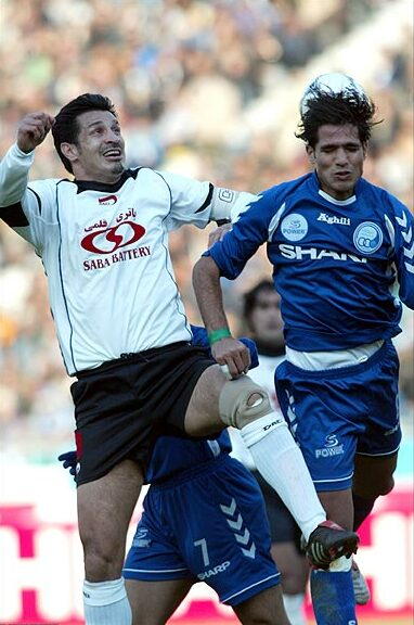 گزارش